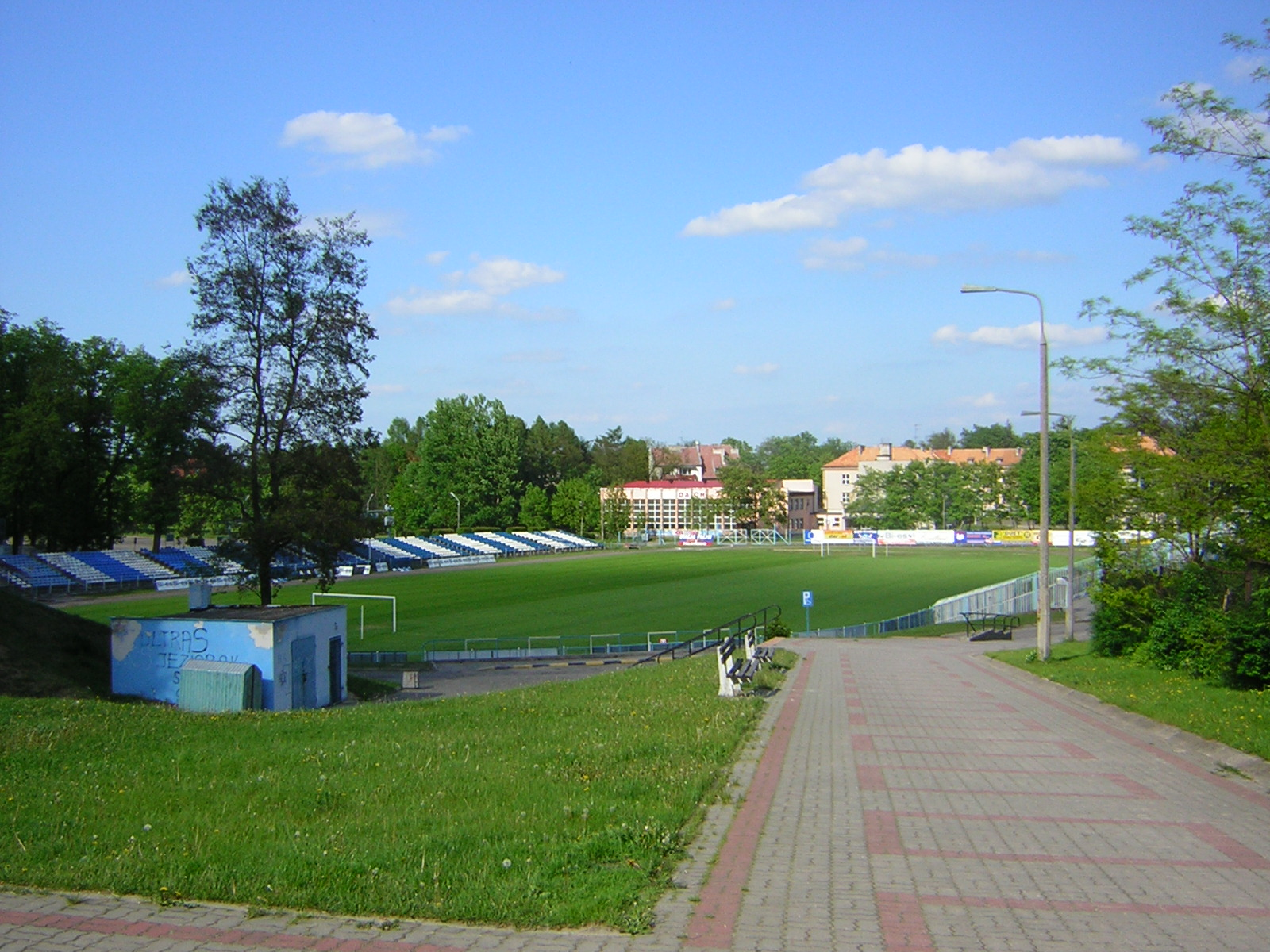 Stadion miejskie w Iławie Autor: Marcin n MARCIN N 17:33, 16 June 2006 (UTC)